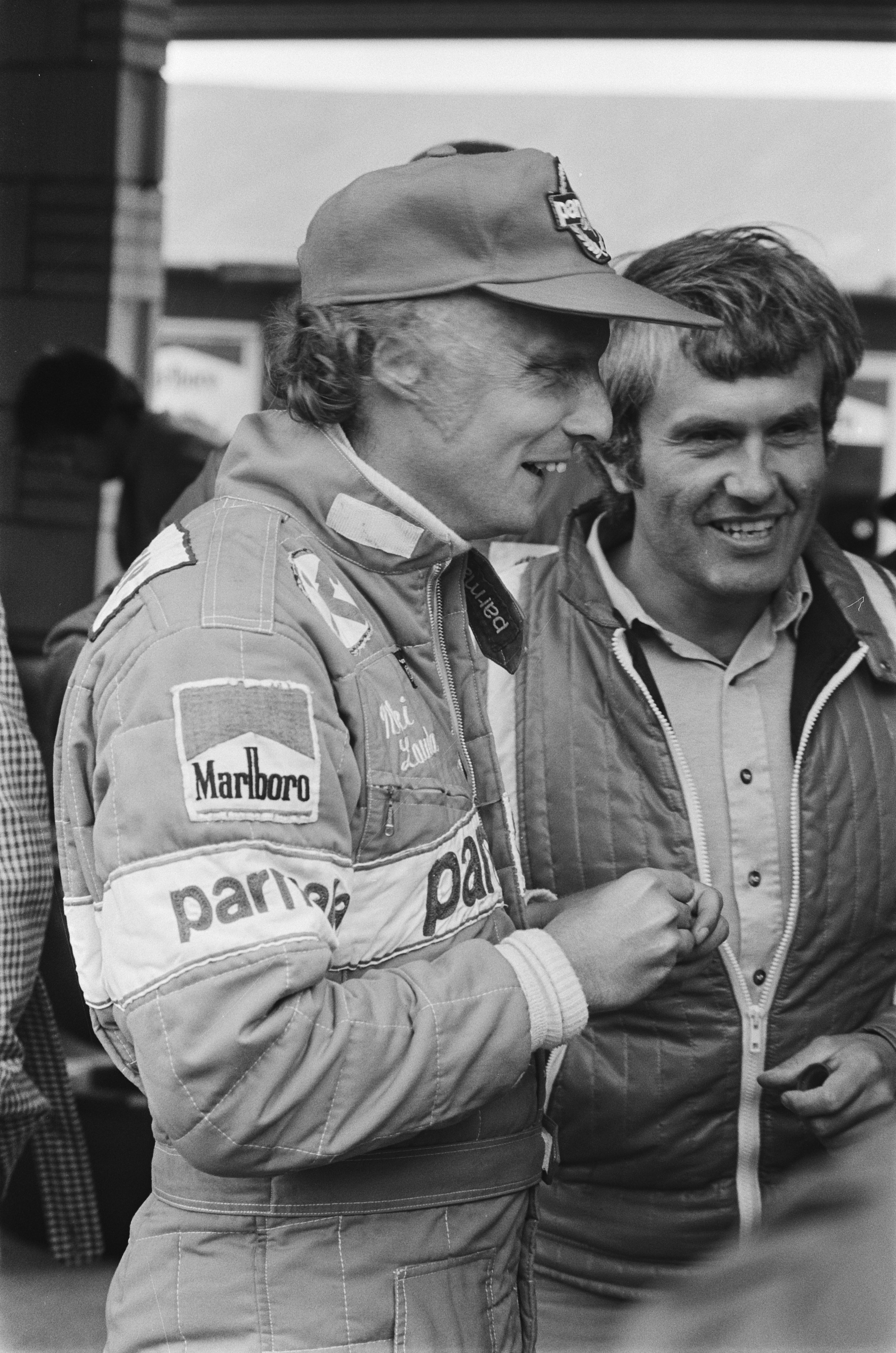 Grand Prix Zandvoort; Niki Lauda (kop).